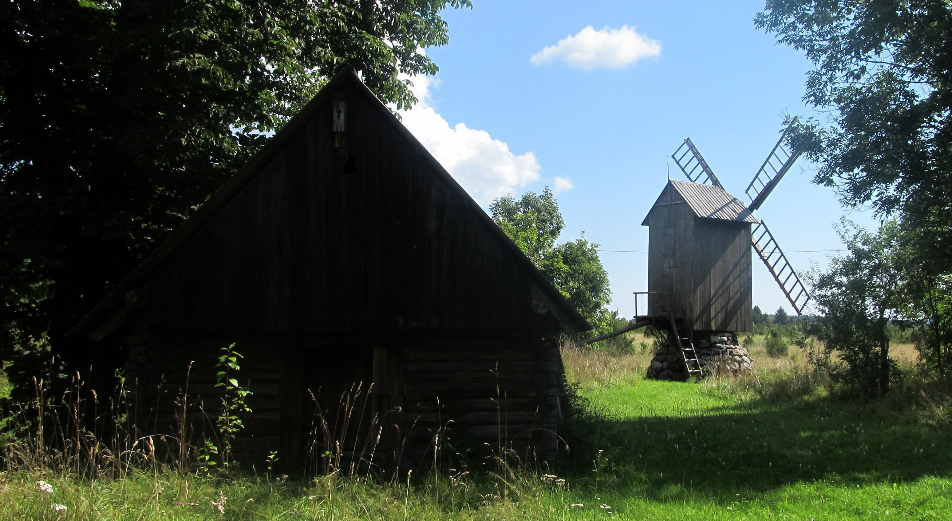 Rudolf Tobiase sünnimaja abihoone ja tuulik. Tuulik on ehitismälestis.